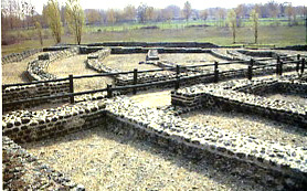 Théâtre romain de Cherré - Aubigné-Racan